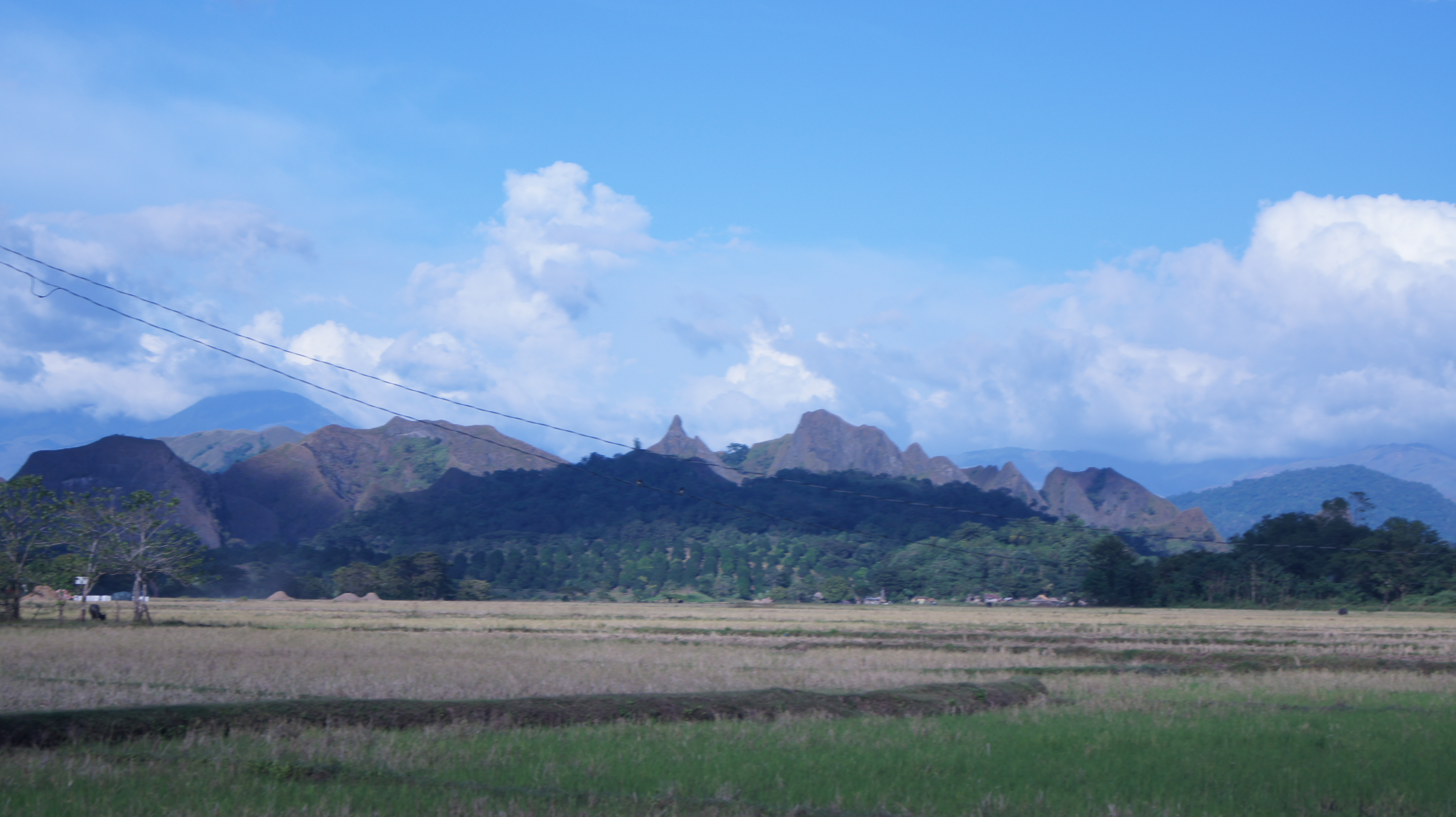 Aguas, Rizal, Occidental Mindoro, Philippines